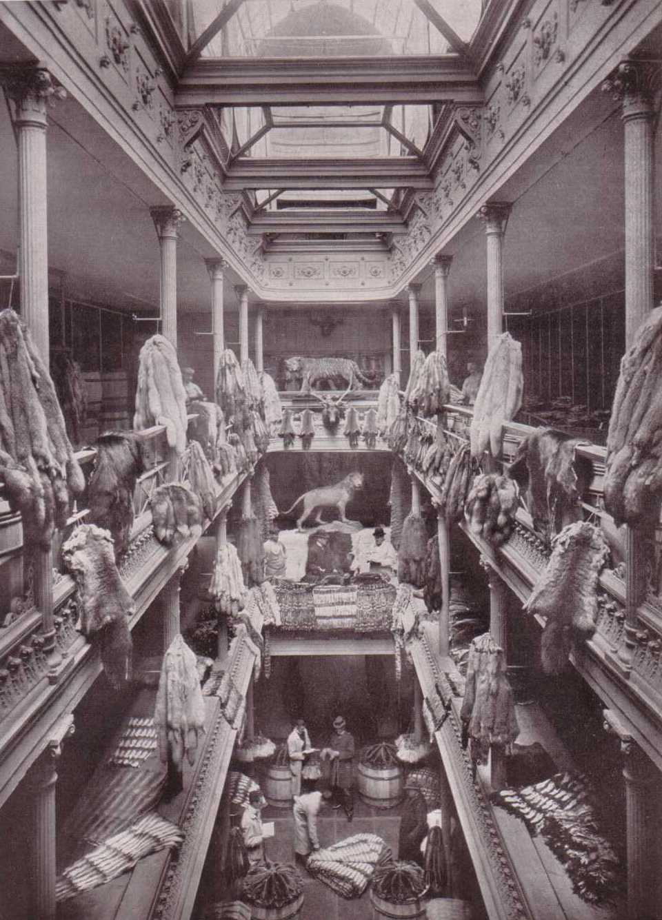 Pelzniederlage von Heinrich Lomer in Leipzig. Aus einer Veröffentlichung im Jahr 1905.